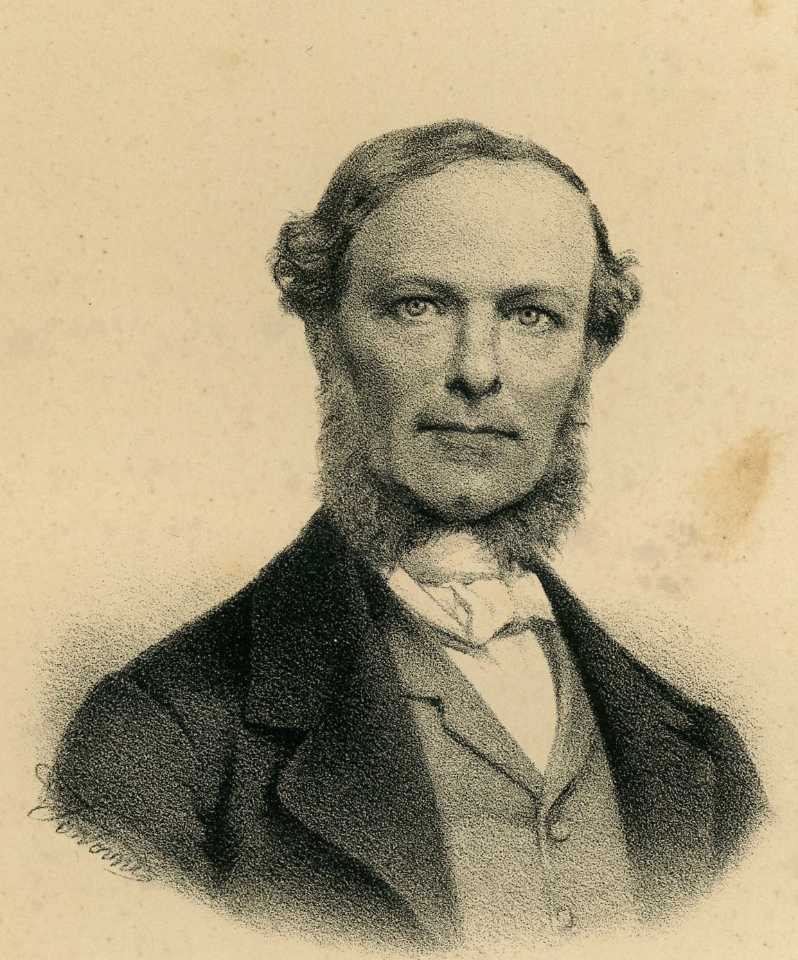 Ammiraglio Persano (litografia).